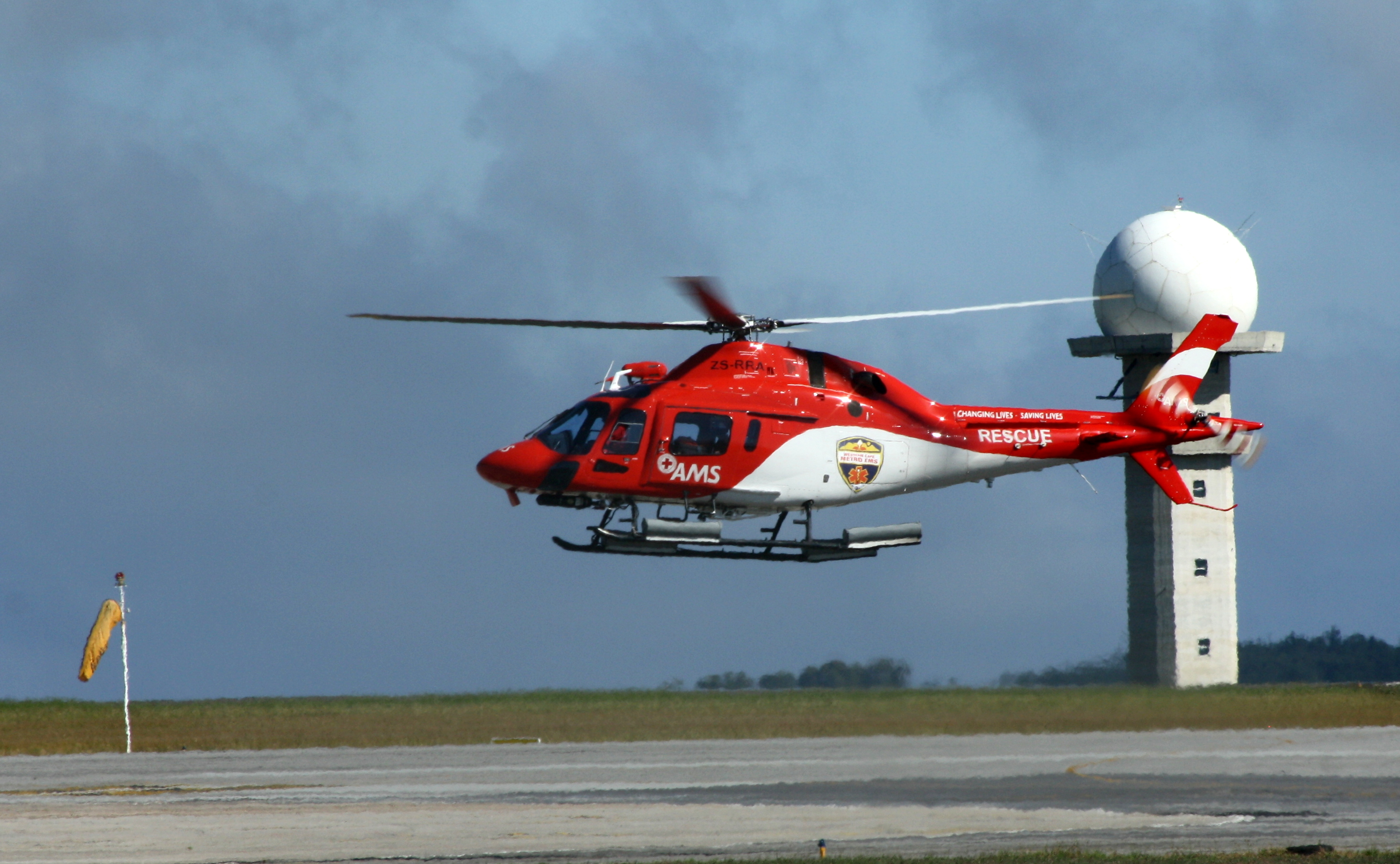 AMS Agusta AW119 MKII ZS-RRA